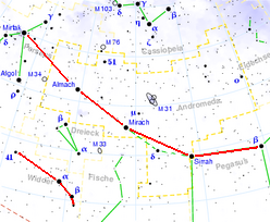 Musterbeispiel einer langen Sternreihe; darunter die "Spirale" des Sternbilds Widder